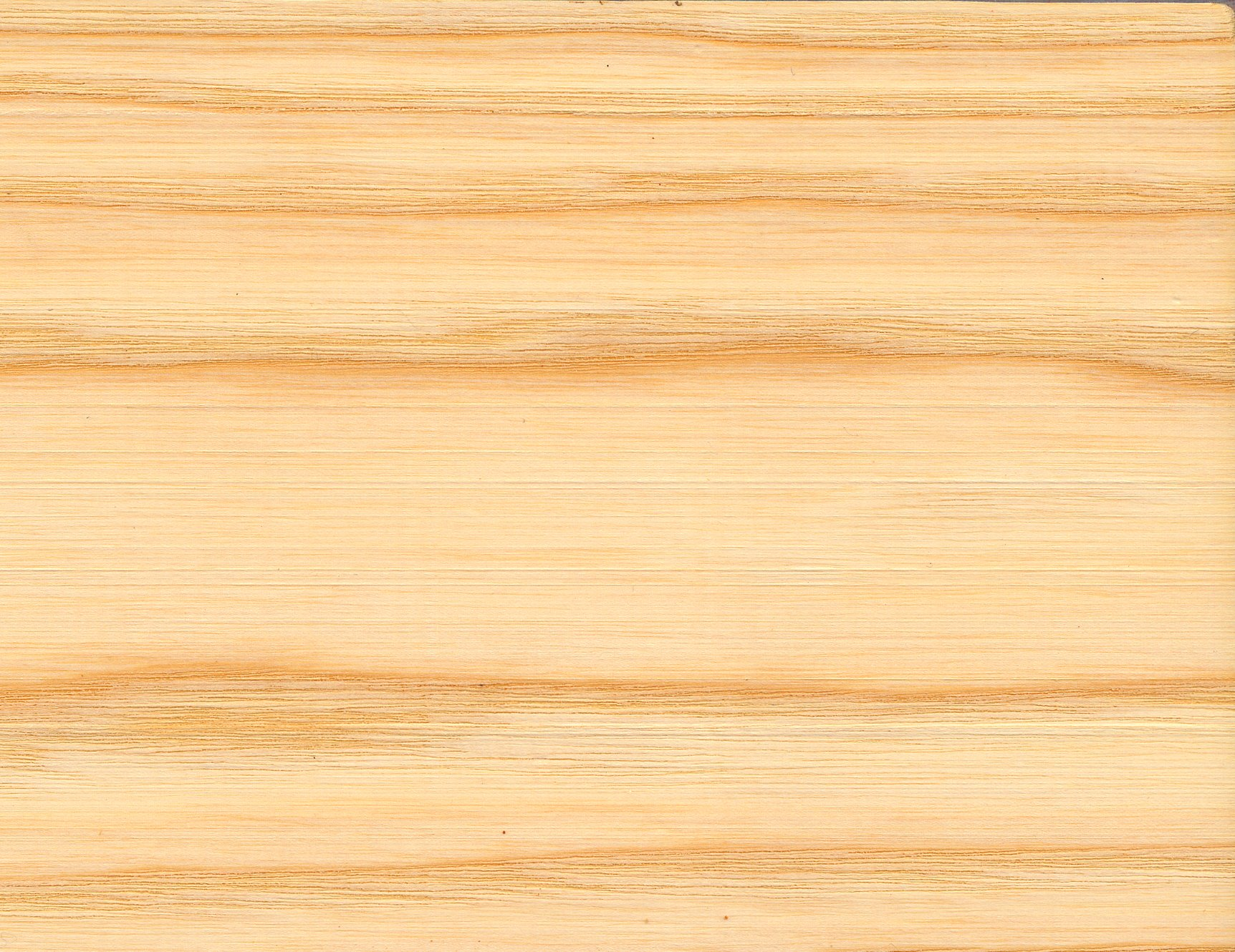 Fraxinus excelsior, przekrój styczny przez drewno jesiona wyniosłego